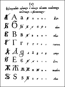 Гражданская азбука с исправлениями Петра I. (Civil Russian alphabet with marks by Peter I.) Page 1.